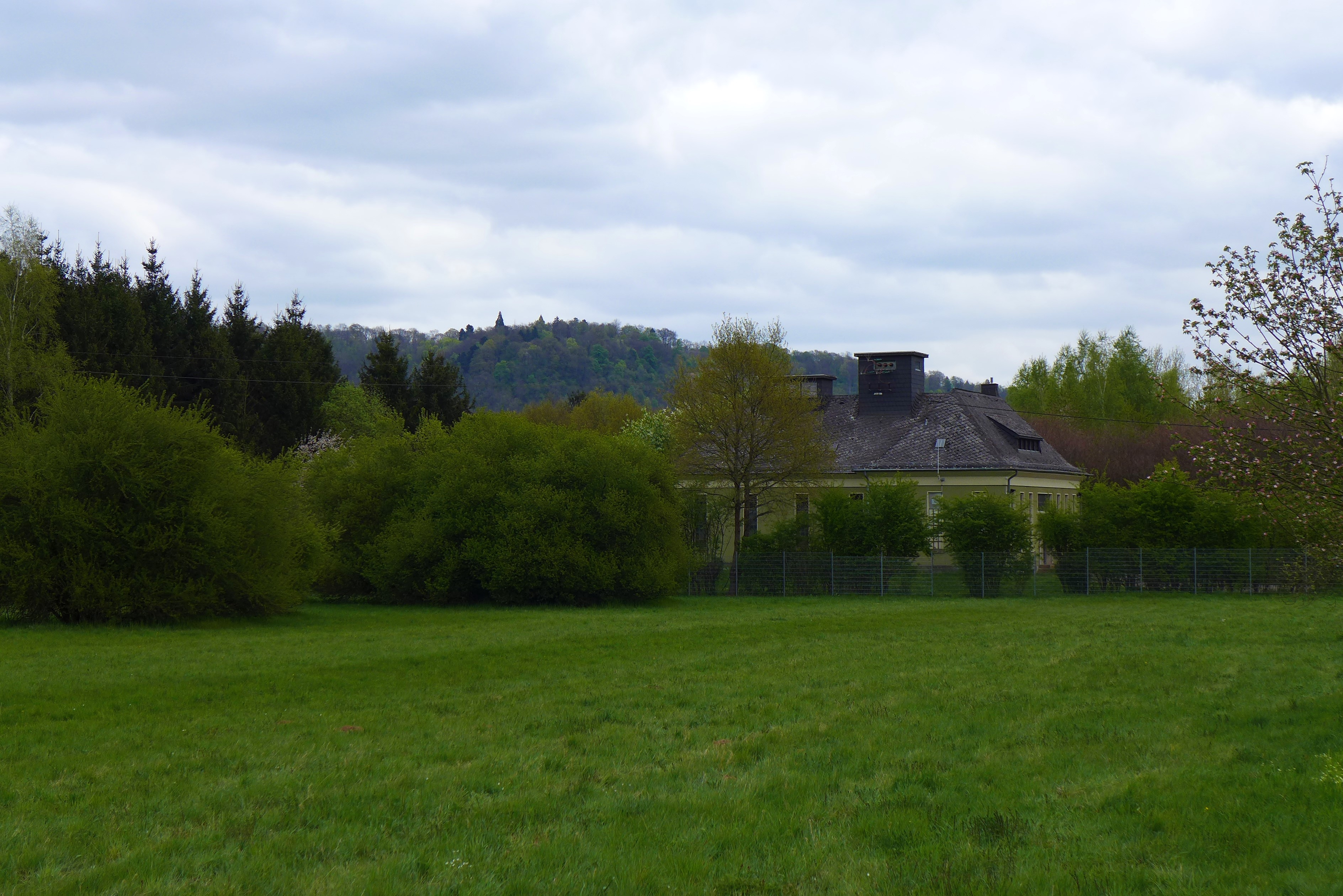 Wallerfangen, Wasserwerk "Schäferbruch" im Blauloch